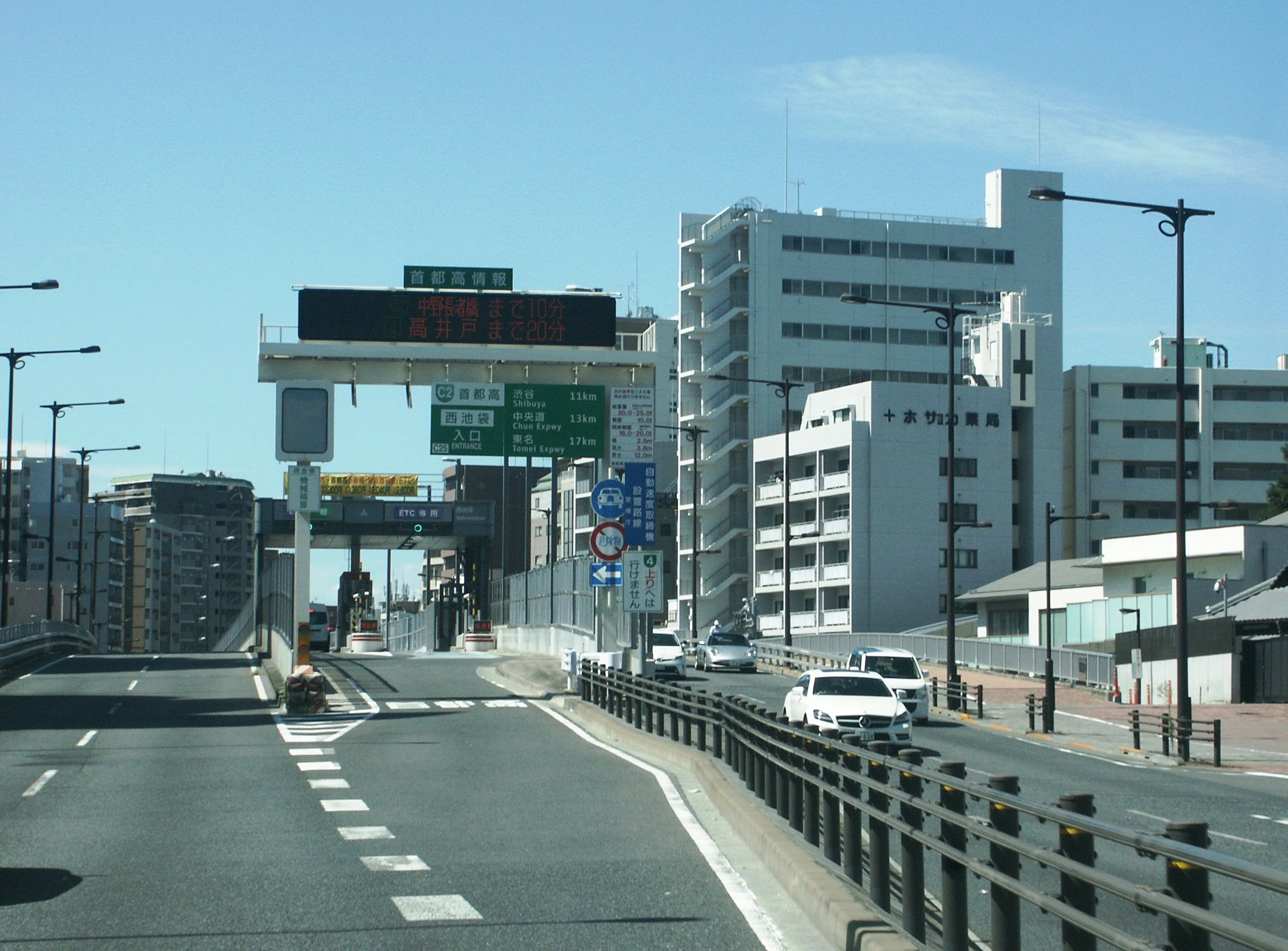 首都高速道路中央環状線西池袋入口付近（西新宿ＪＣＴ方面側入口）